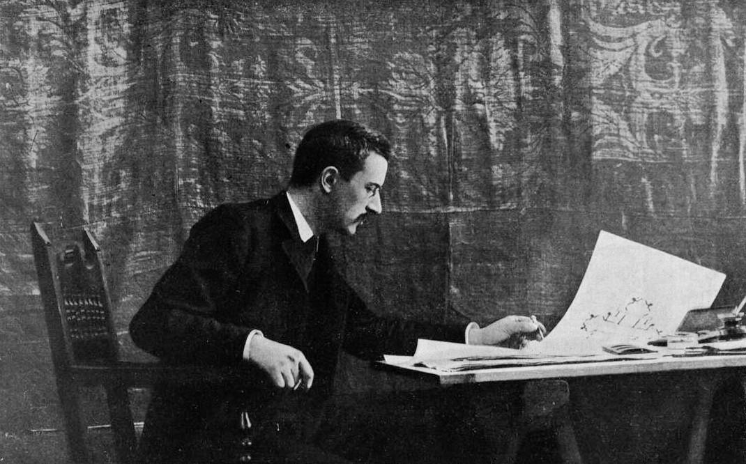 Luca Beltrami al lavoro